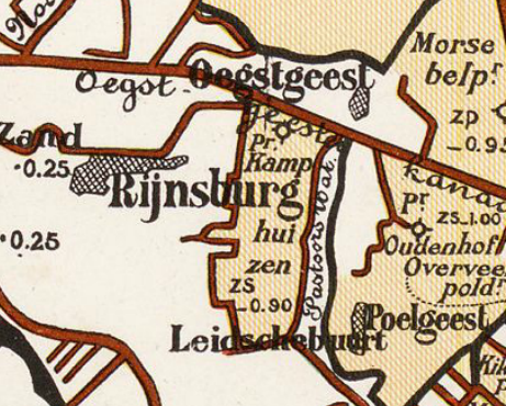 Kamphuizen